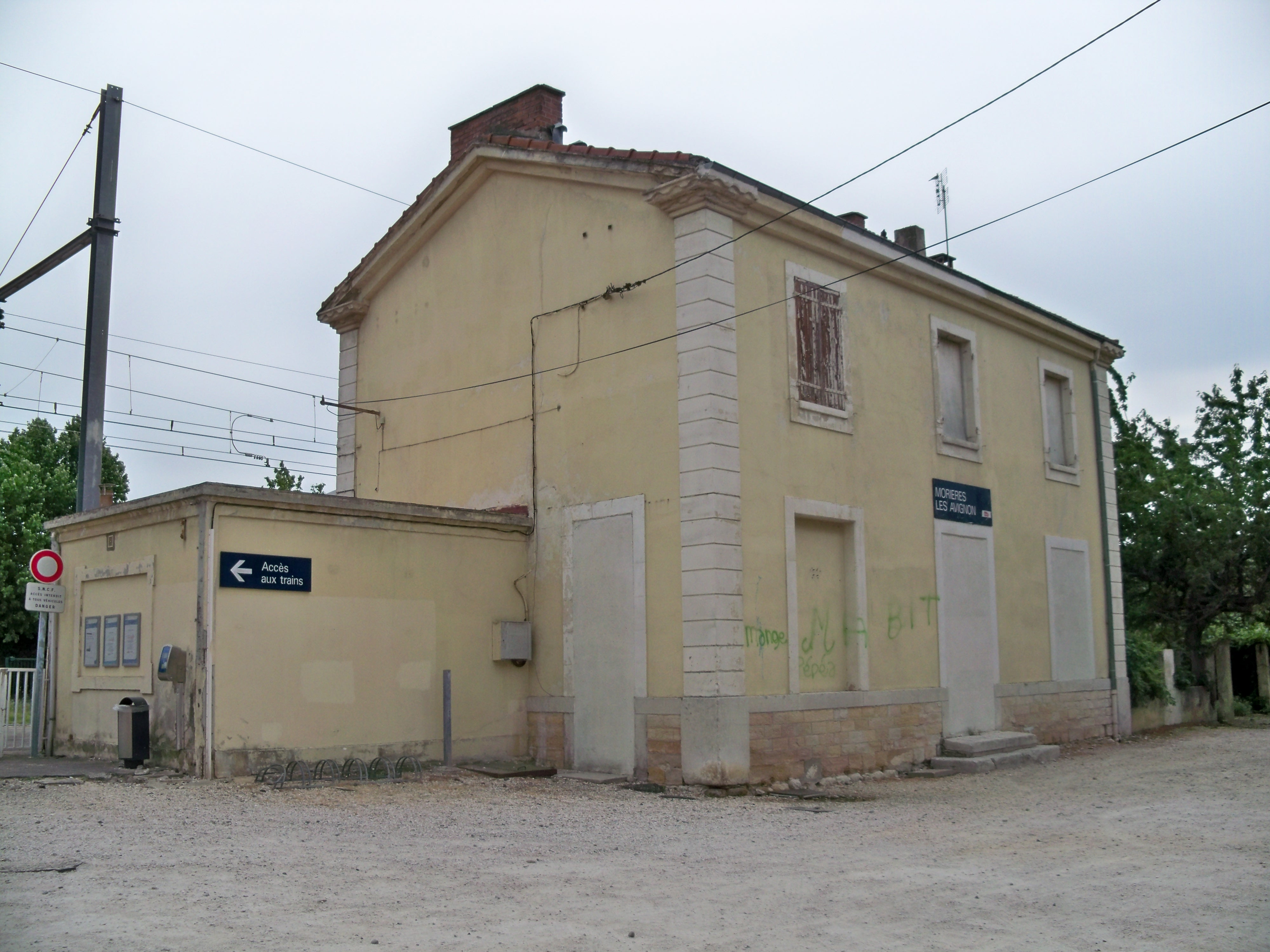 Gare SNCF de Morières les Avignon, Vaucluse, France